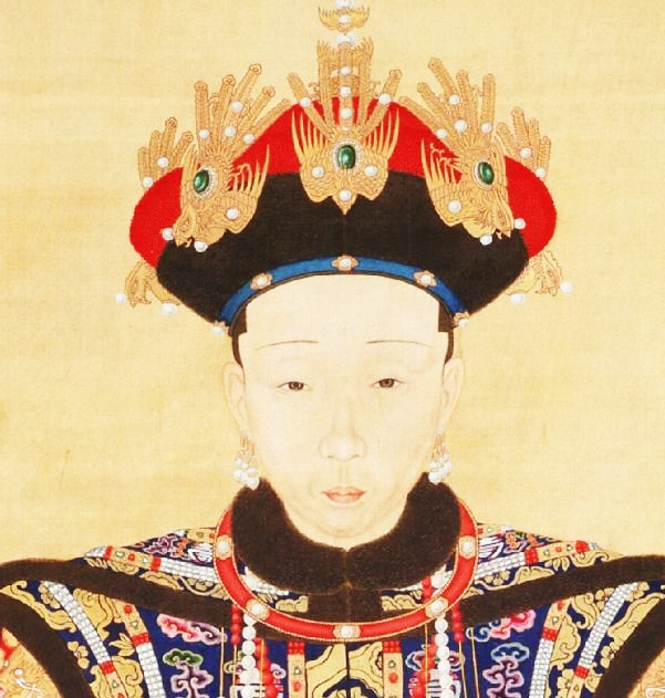 清 佚名 《清高宗乾隆孝仪纯皇后朝服像》